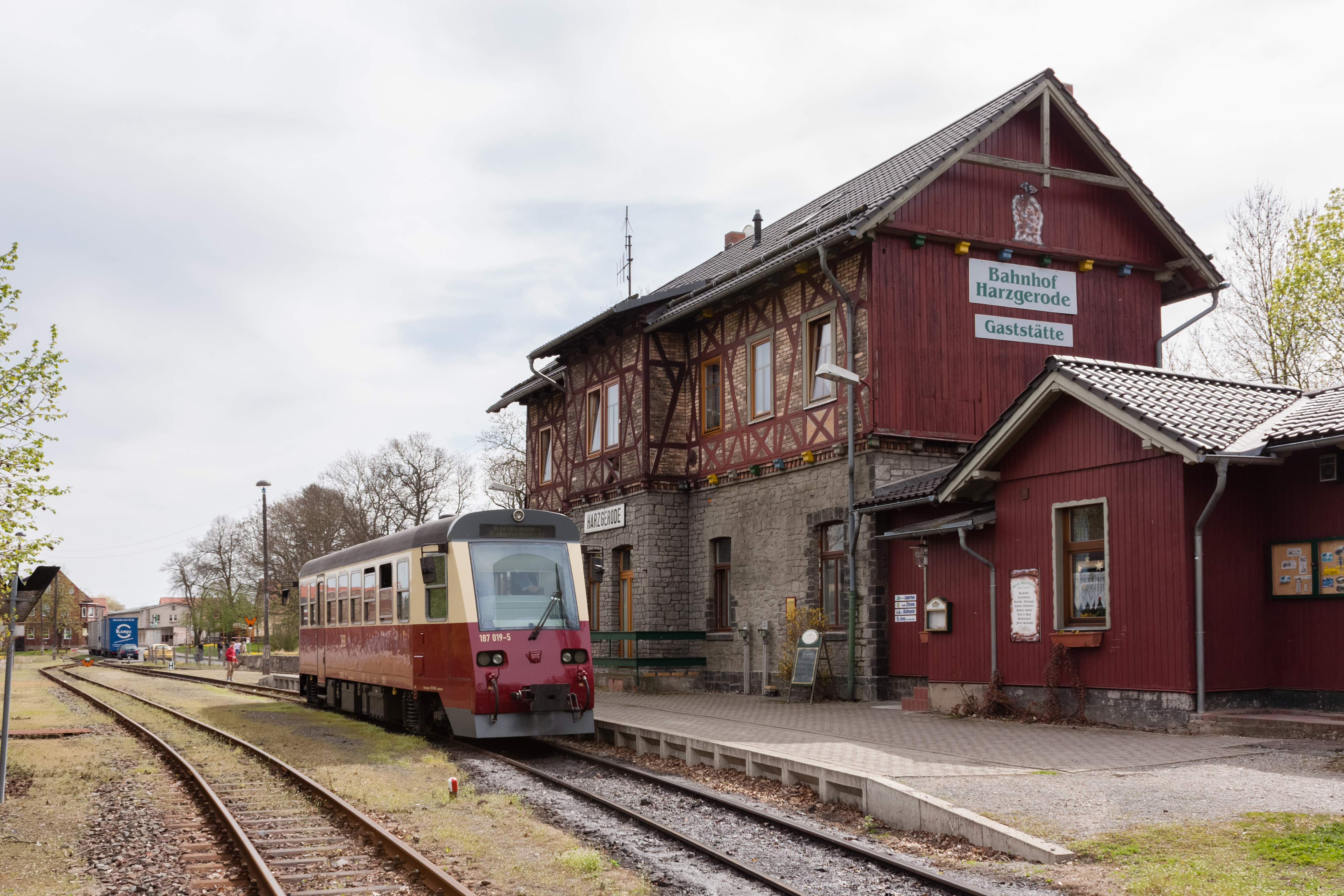 Triebwagen in Harzgerode